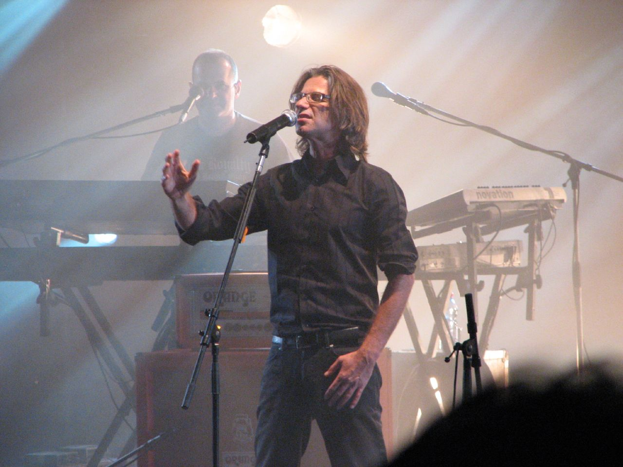 Yuval Banay